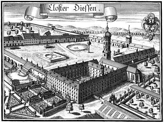 Kloster Dießen, aus: Historico-topographica descriptio Bavariae, 1701–1726